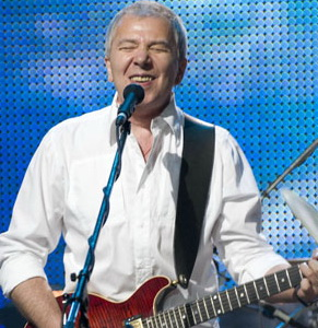 На 30-летии группы «Воскресение» в ГЦКЗ«Россия» в сентябре 2009 года